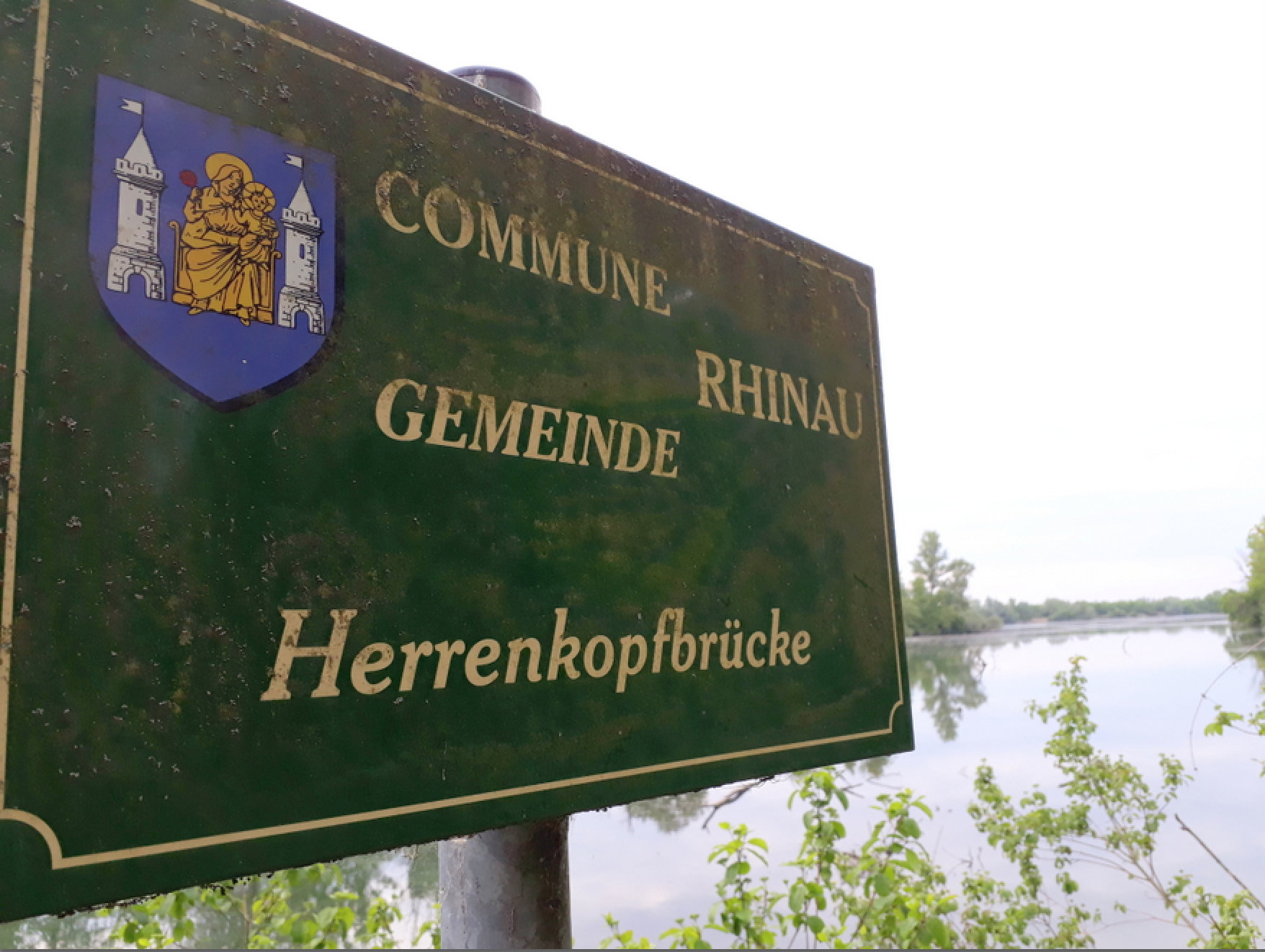 bilinguales Schild an der Herrenkopfbrücke bei 48°17'48.8"N 7°42'00.9"E.